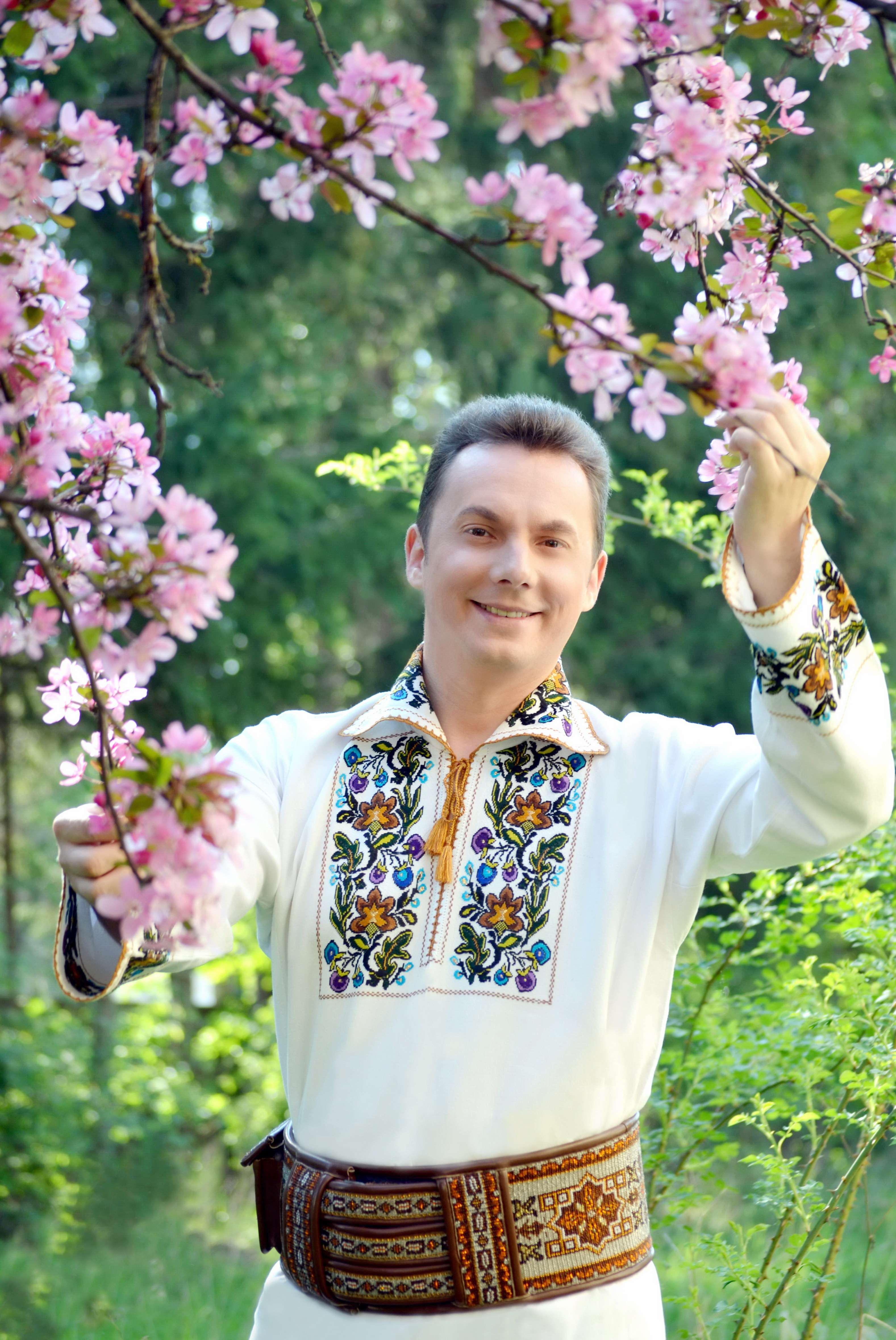 Marius Zgaianu - primavara